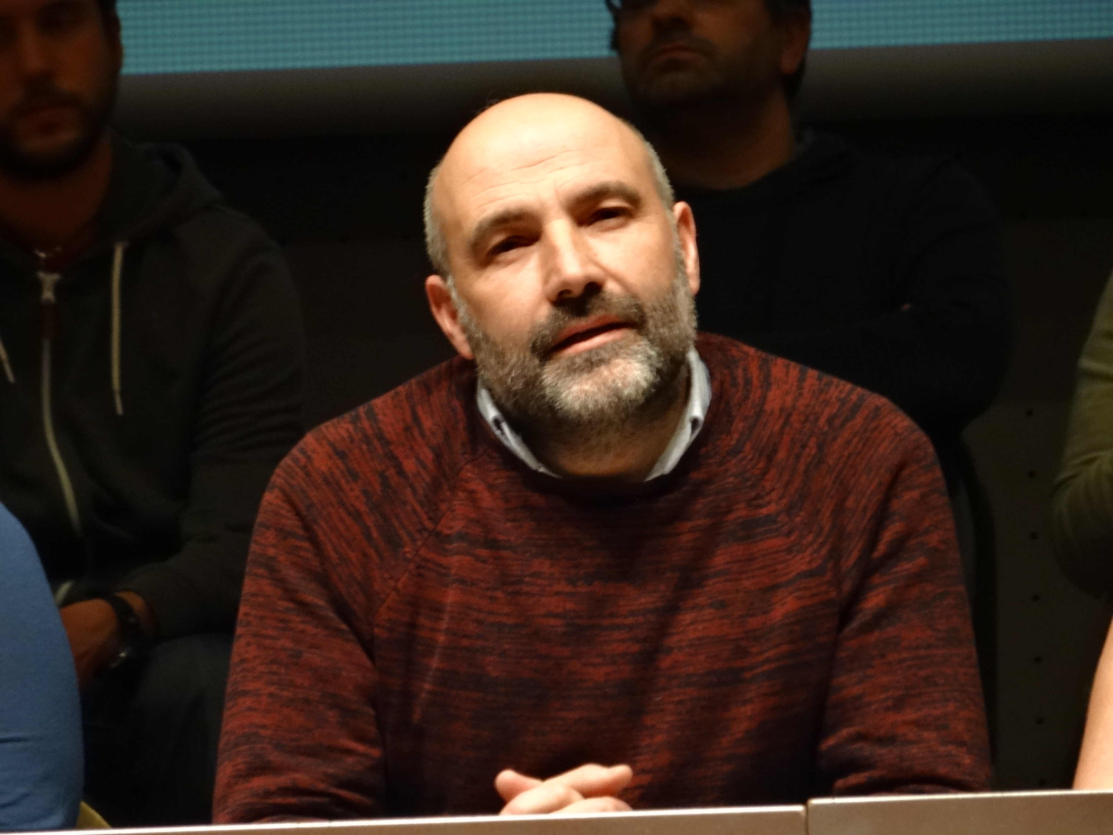 Ver título.